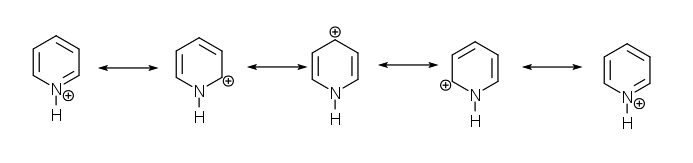 ion pyridium